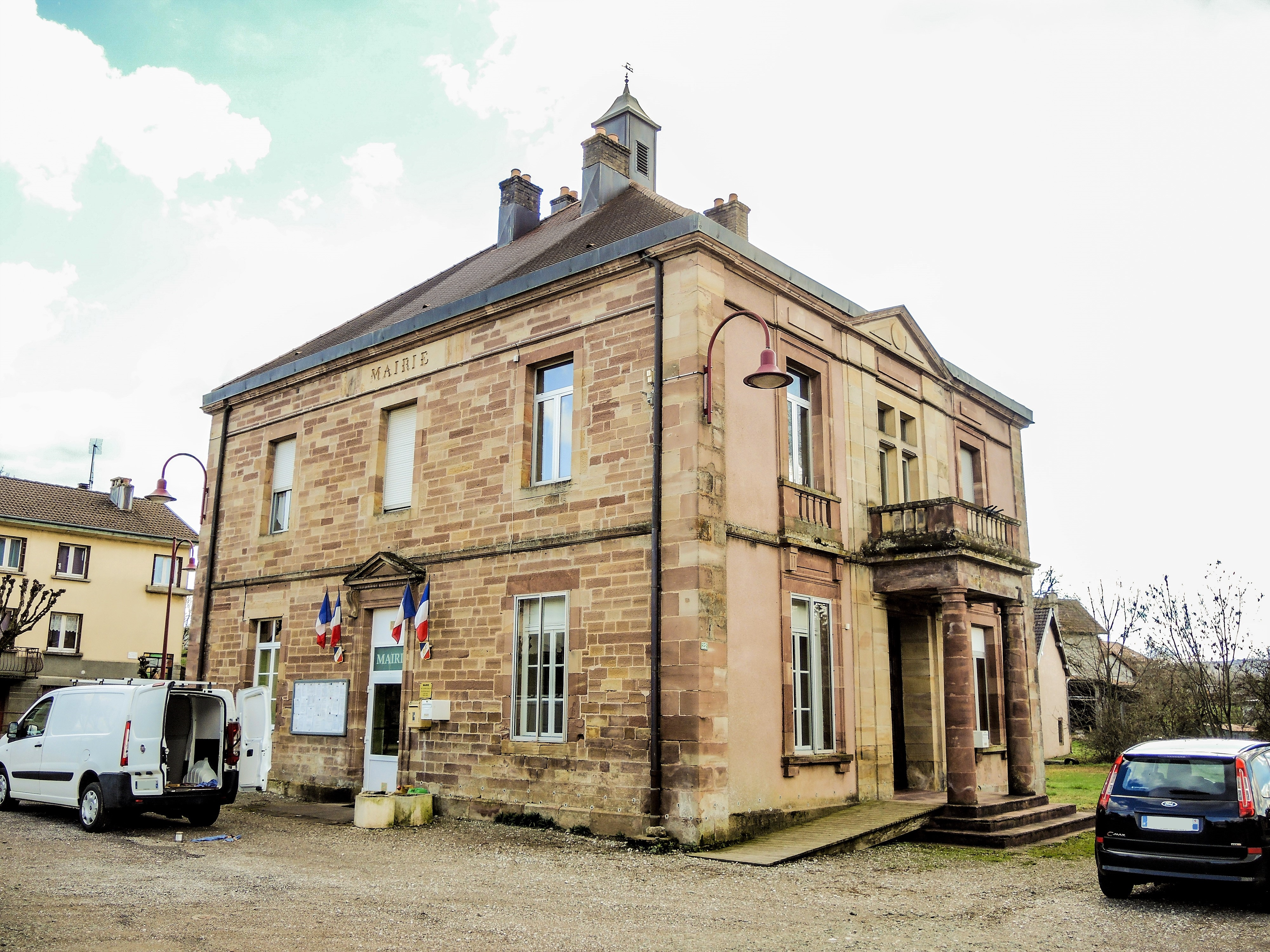 Mairie du village